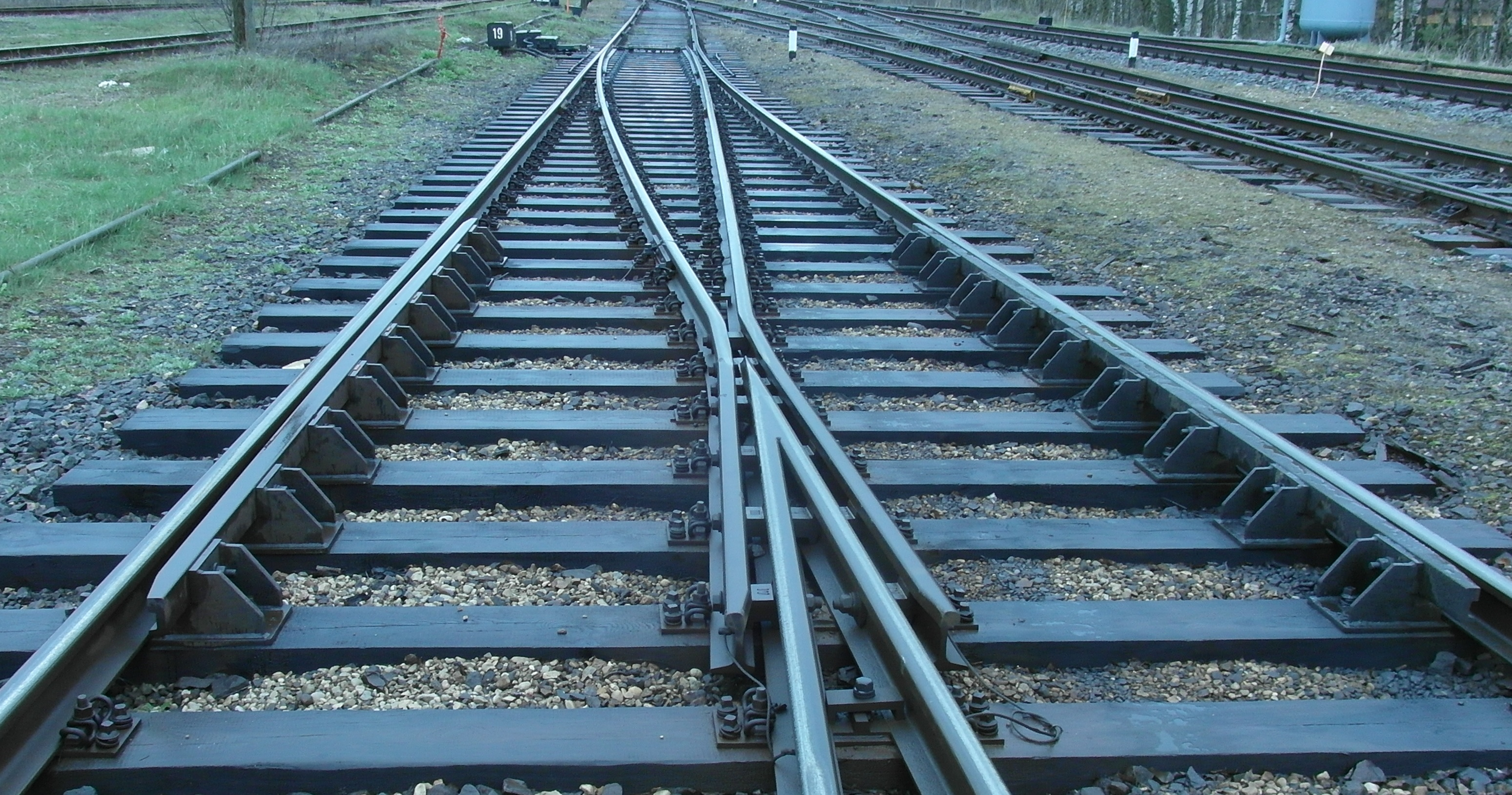 1/9 R50 pārmiju pārveda